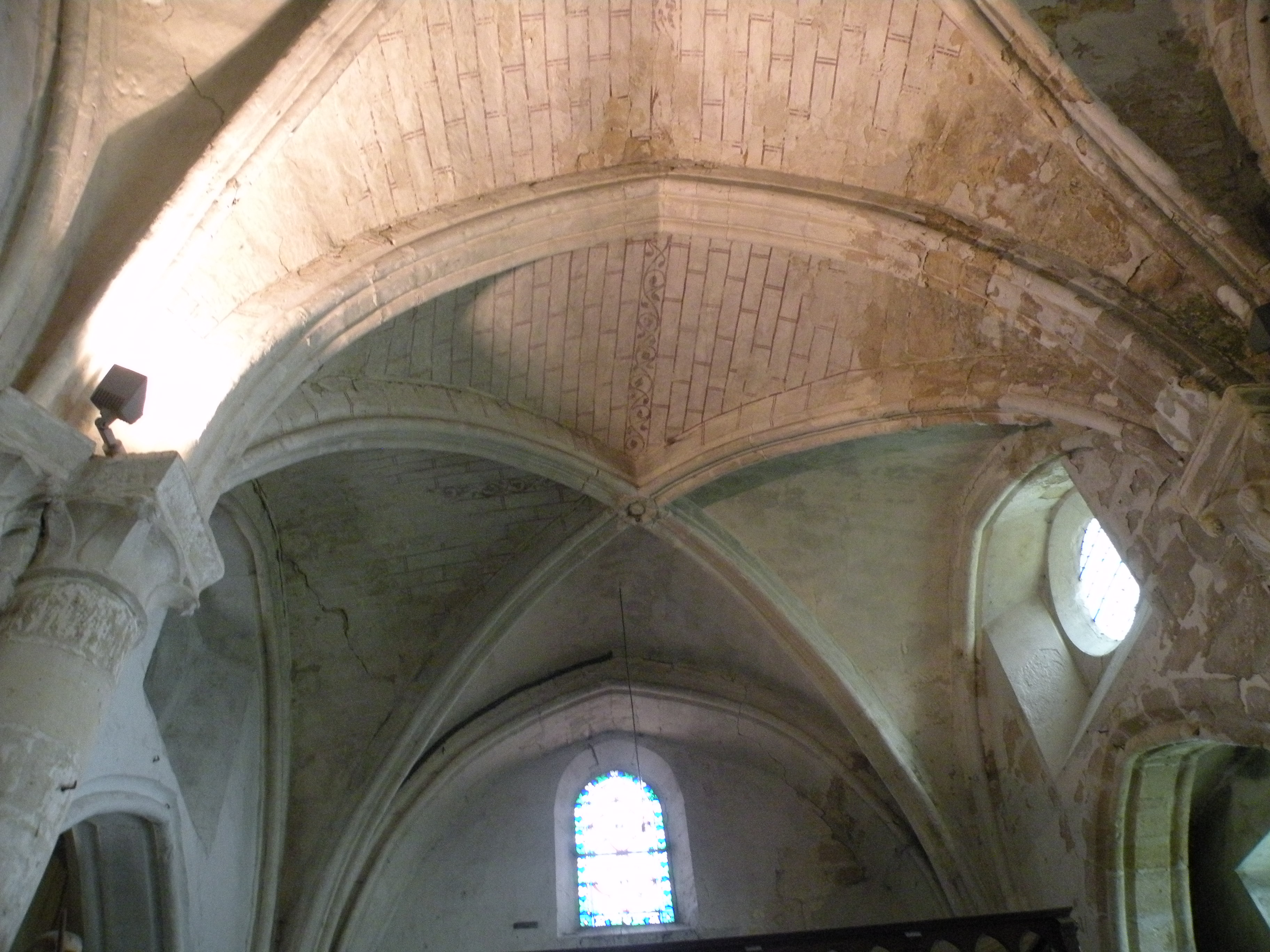 Intérieur de l'église Saint-Martin de Vallangoujard